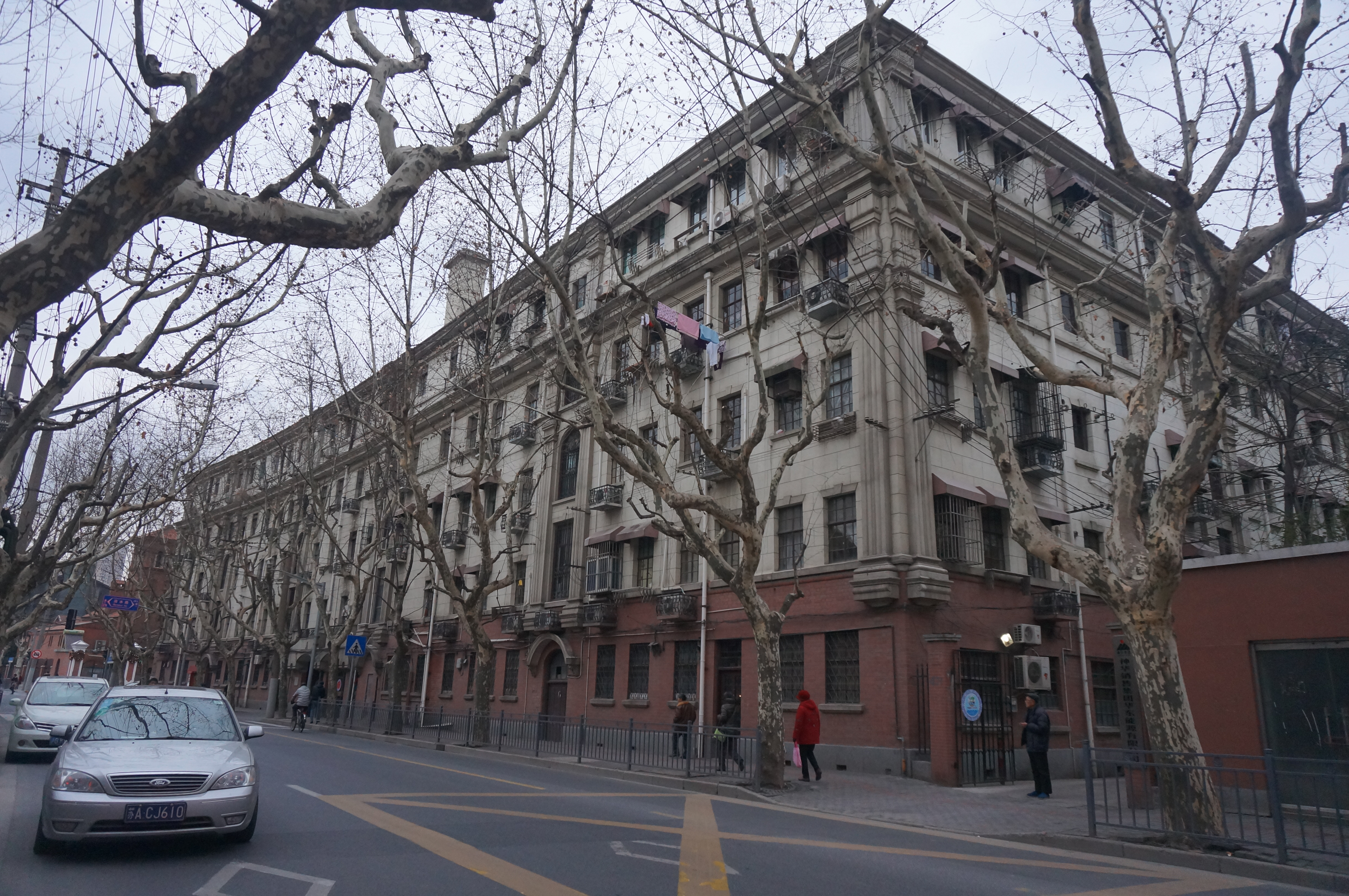 中文（中国大陆）: 上海花园公寓